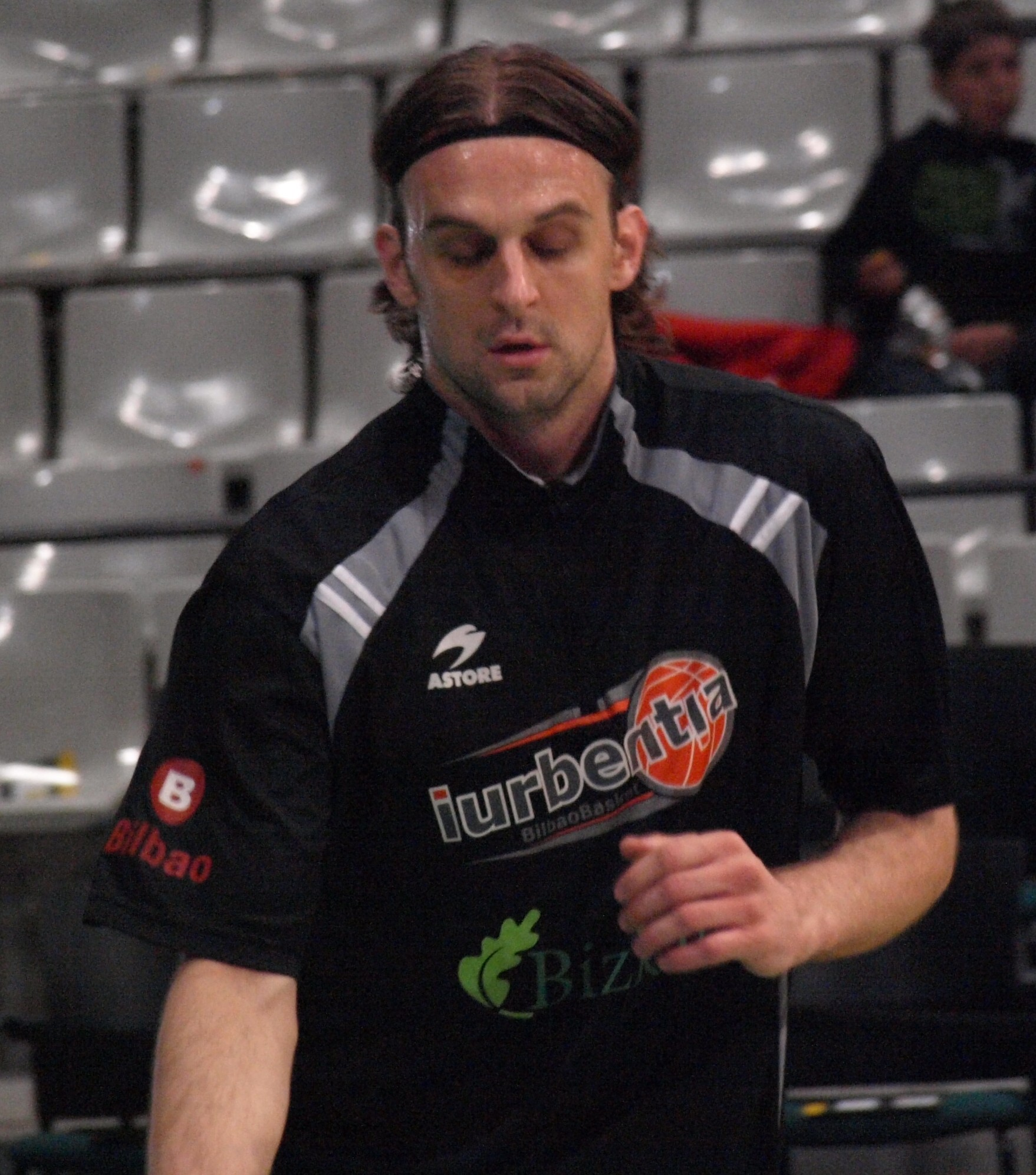 Drago Pasalic en el encuentro que enfrentó al Iurbetia Bilbao con el DKV Joventut de la liga ACB 2008/09 en el olímpico de Badalona